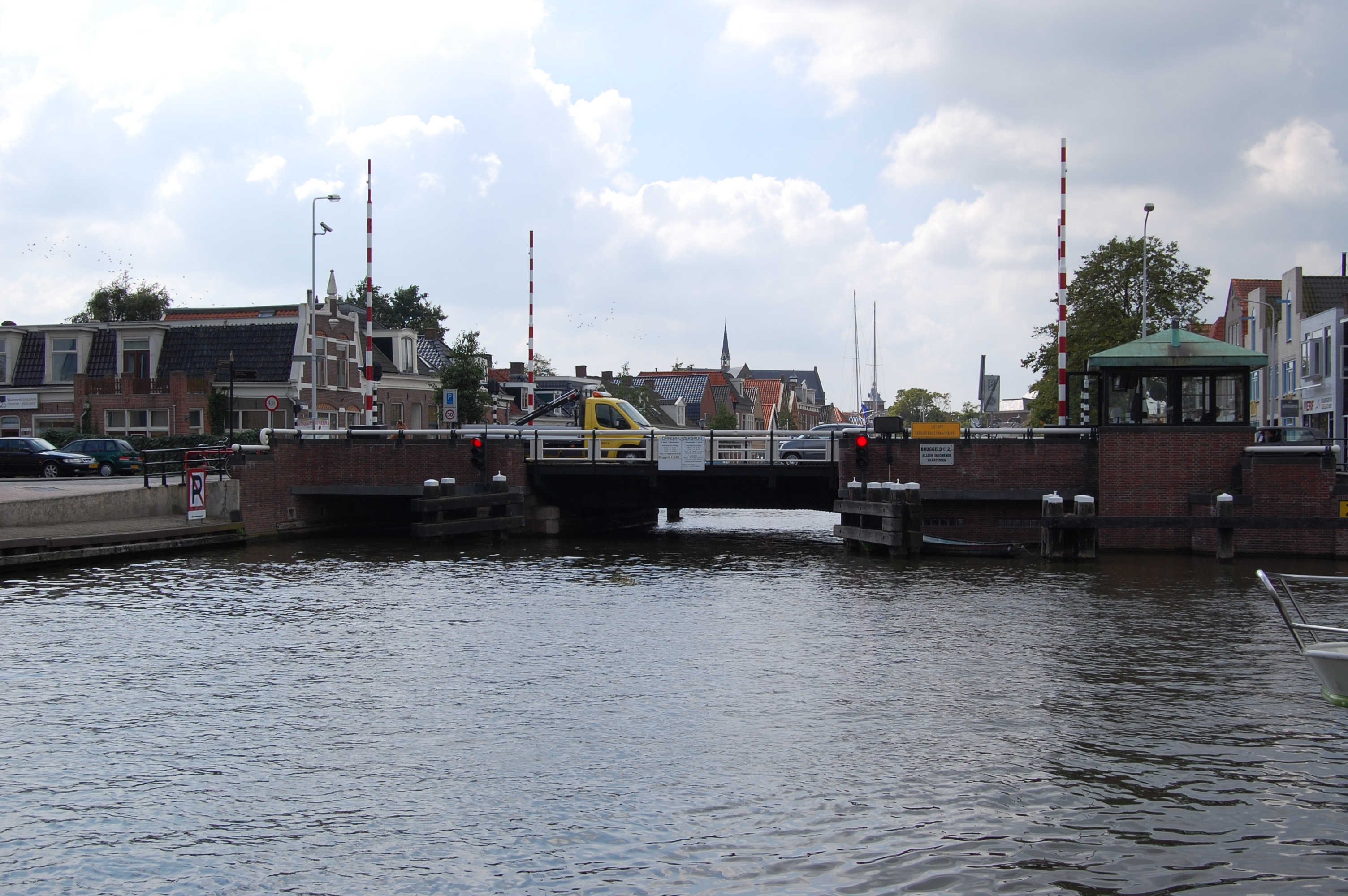 De Oppenhuizerbrug in Sneek die toegang geeft vanuit het Zomerrak tot de Stadsgracht